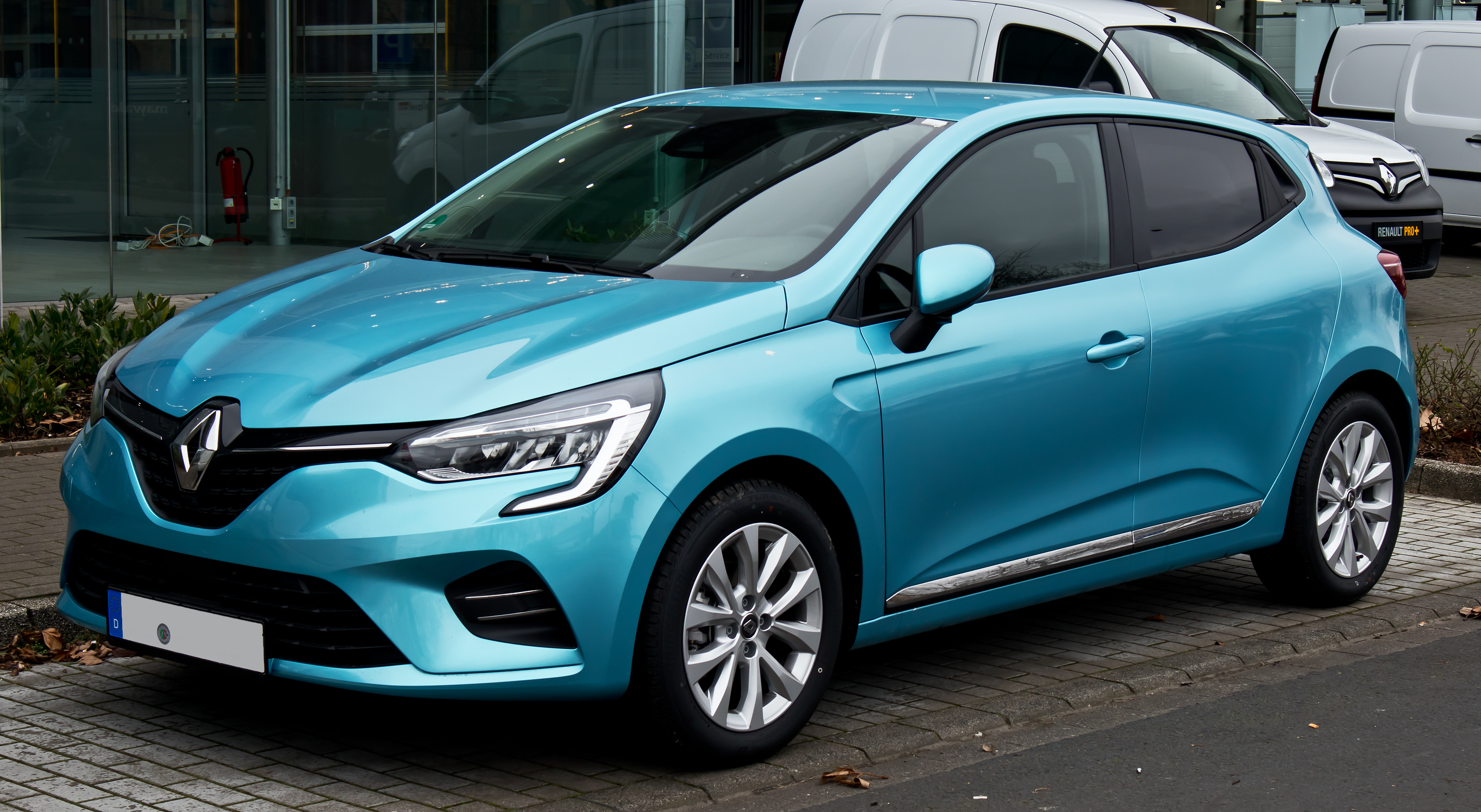 Renault Clio TCe 100 Experience (V)